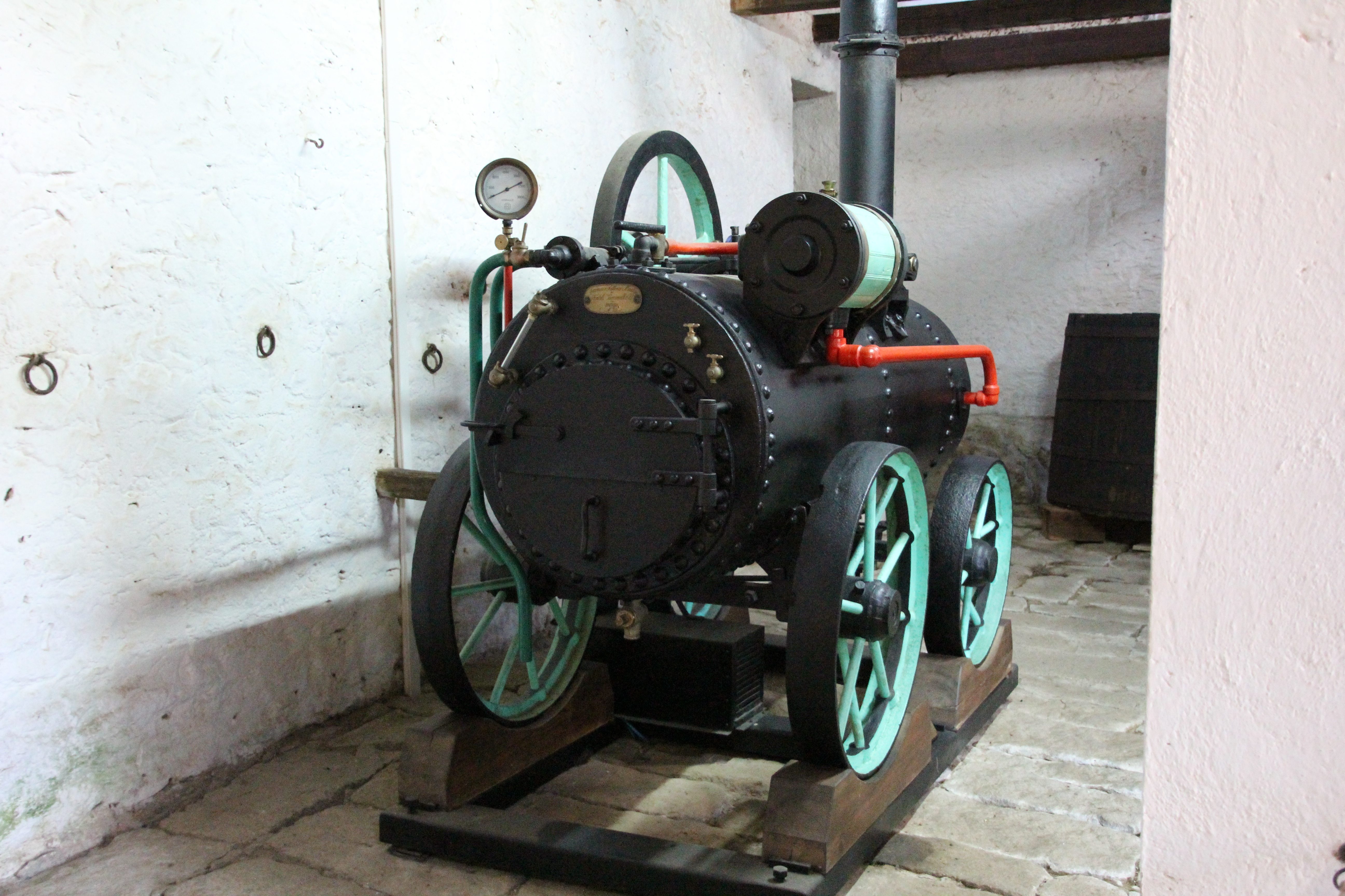 La Maddalena, compendio garibaldino di Caprera